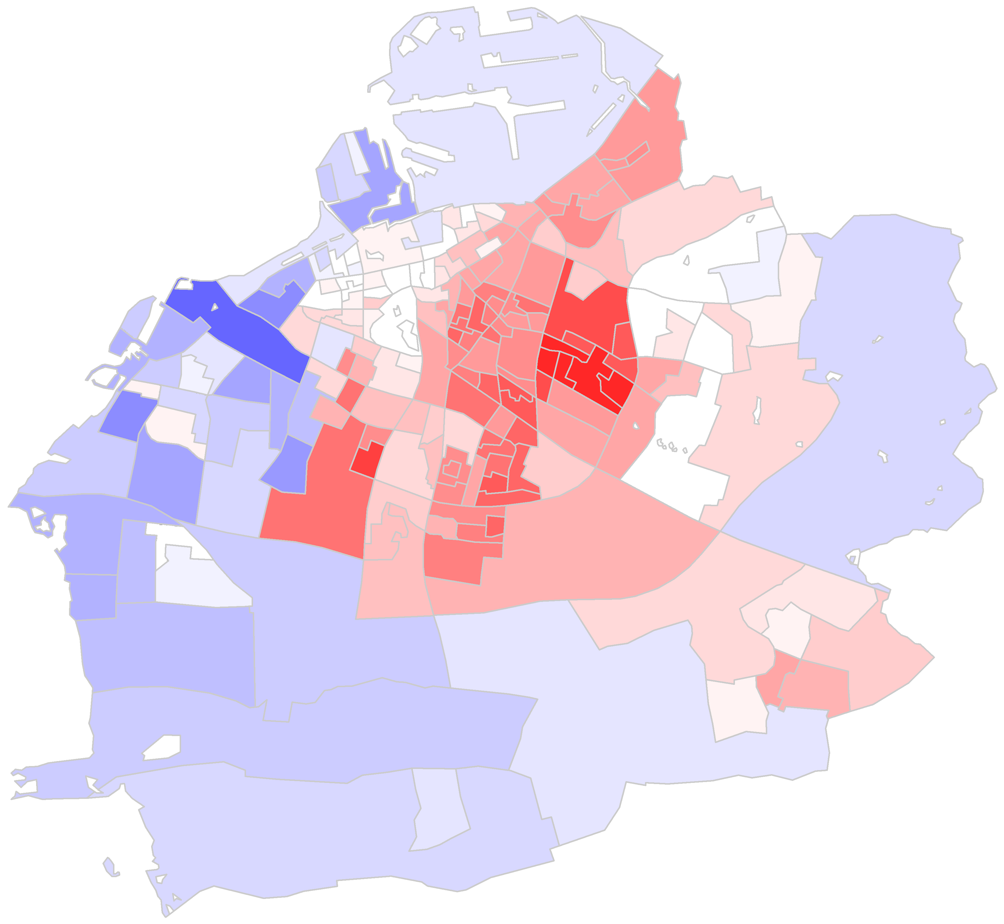 Malmö kommunalval 2014 Skala från rött (S+V+MP) till blått (M+C+FP+KD)